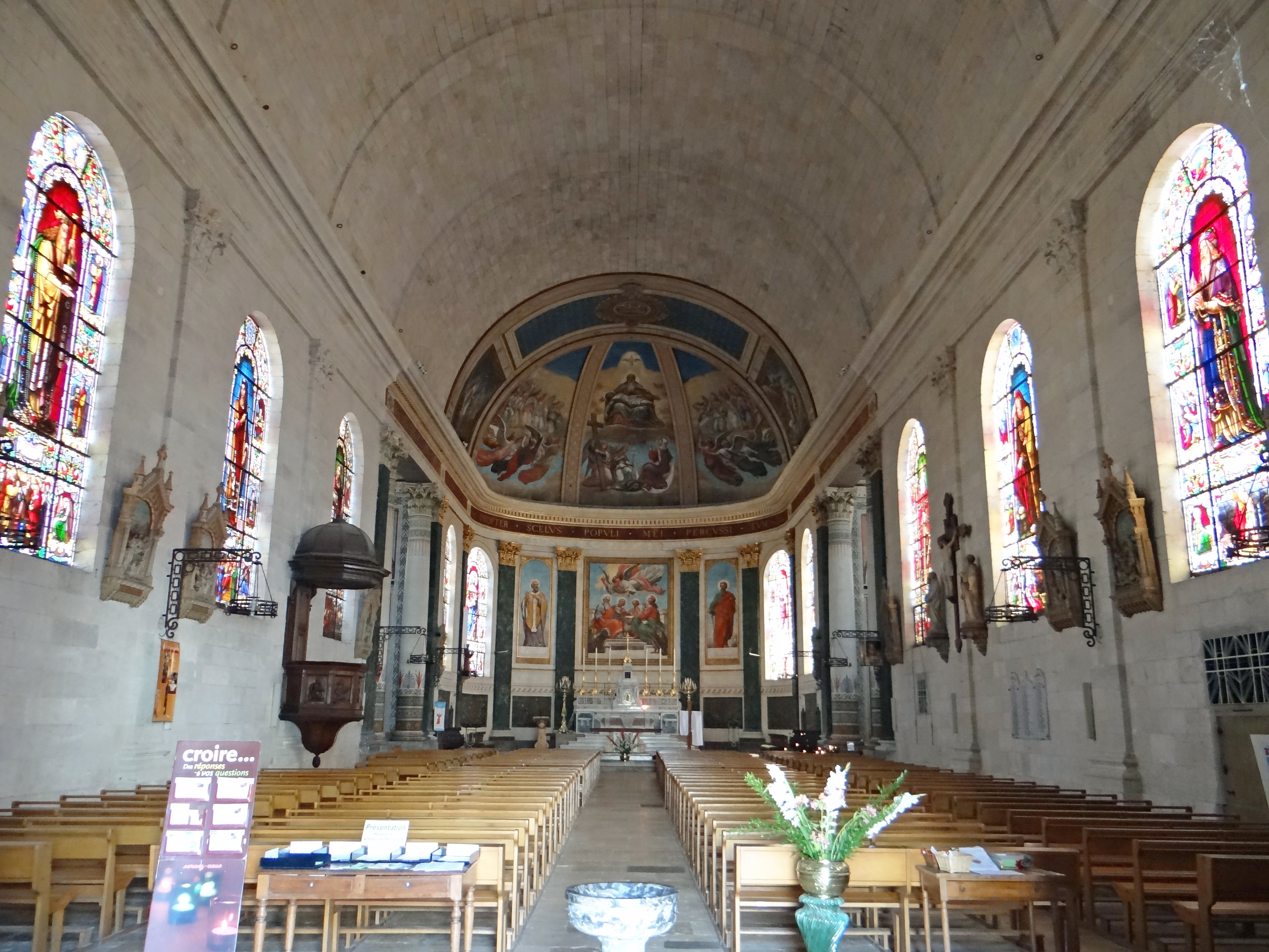 Nérac - Église Saint-Nicolas - Nef